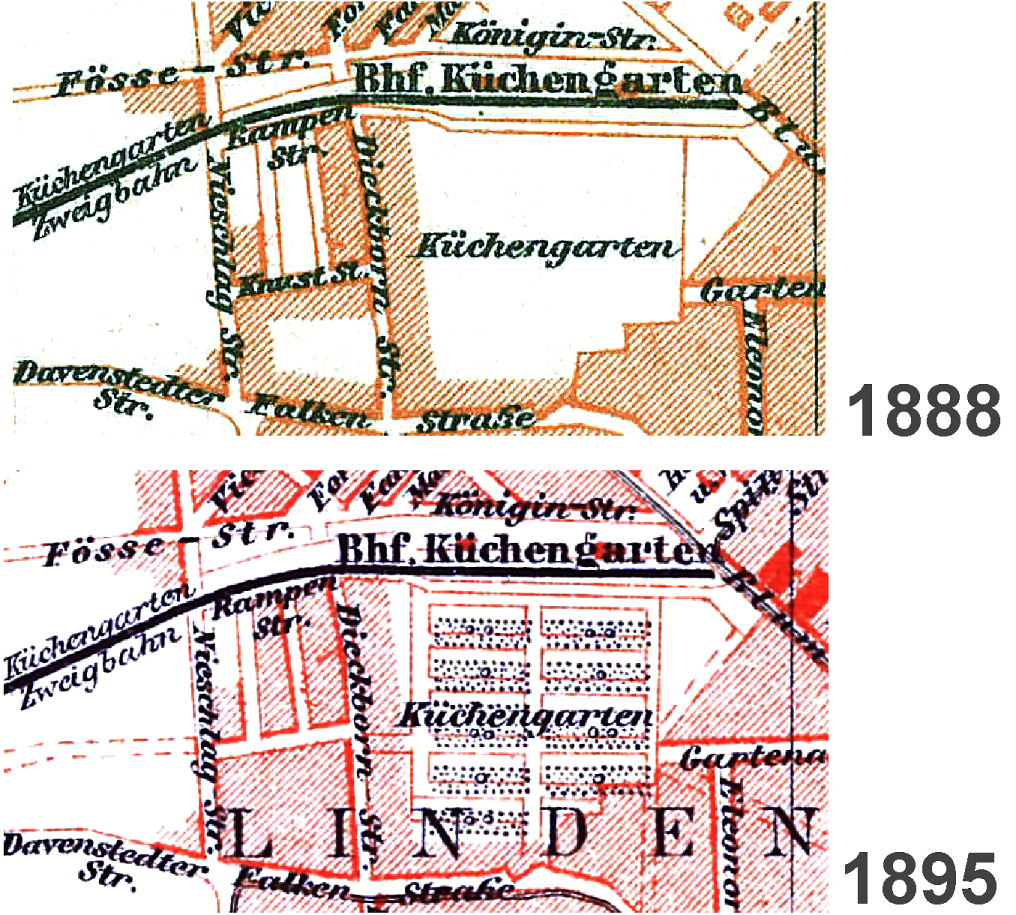 Küchengarten Hannover im Stadtplan 1888 und 1895, Stadtplan Hannover 1895 Meyers Konversations-Lexikon 5. Auflage